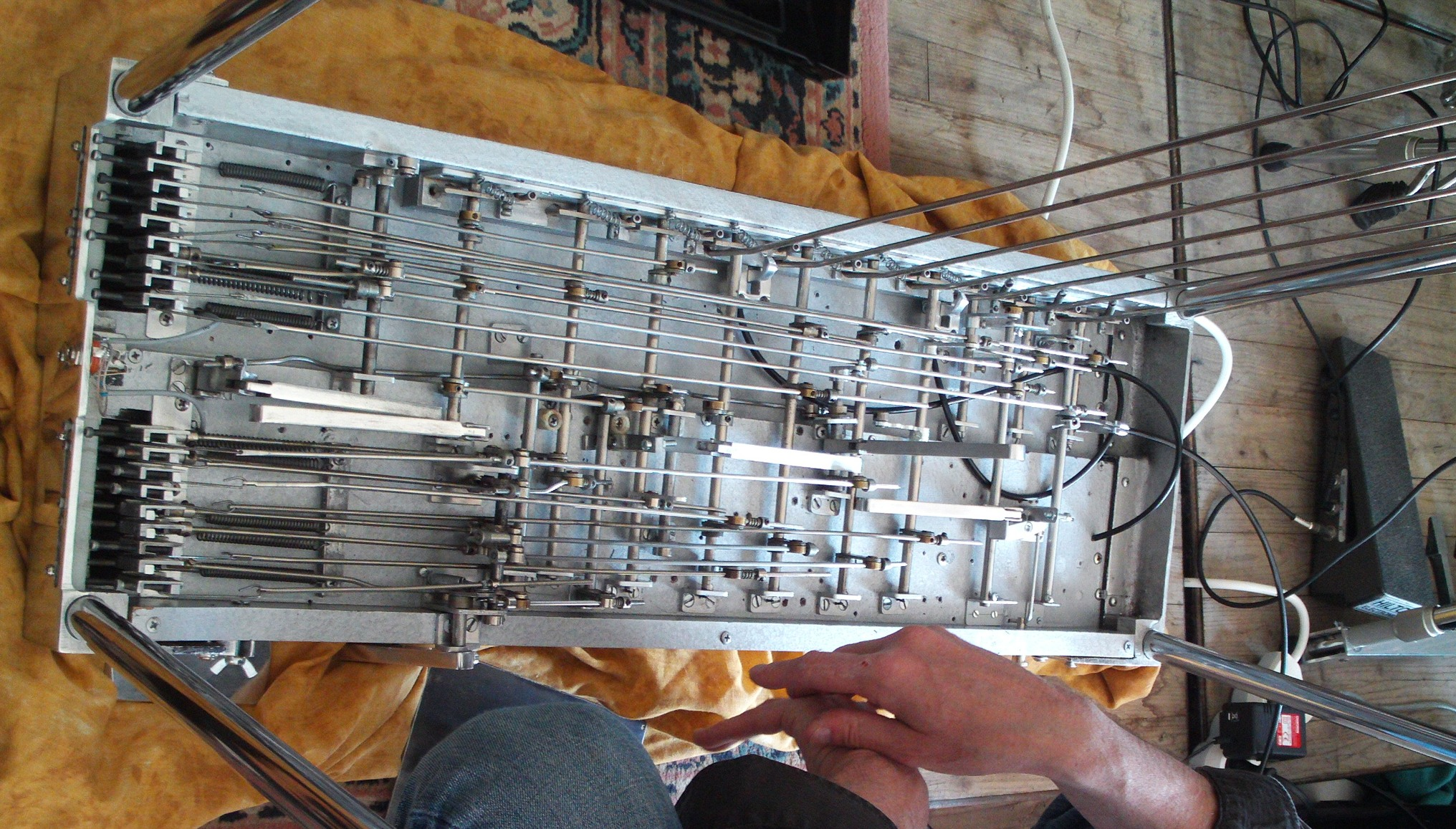 interieur de la PSG montrant le mécanisme et la tringlerie